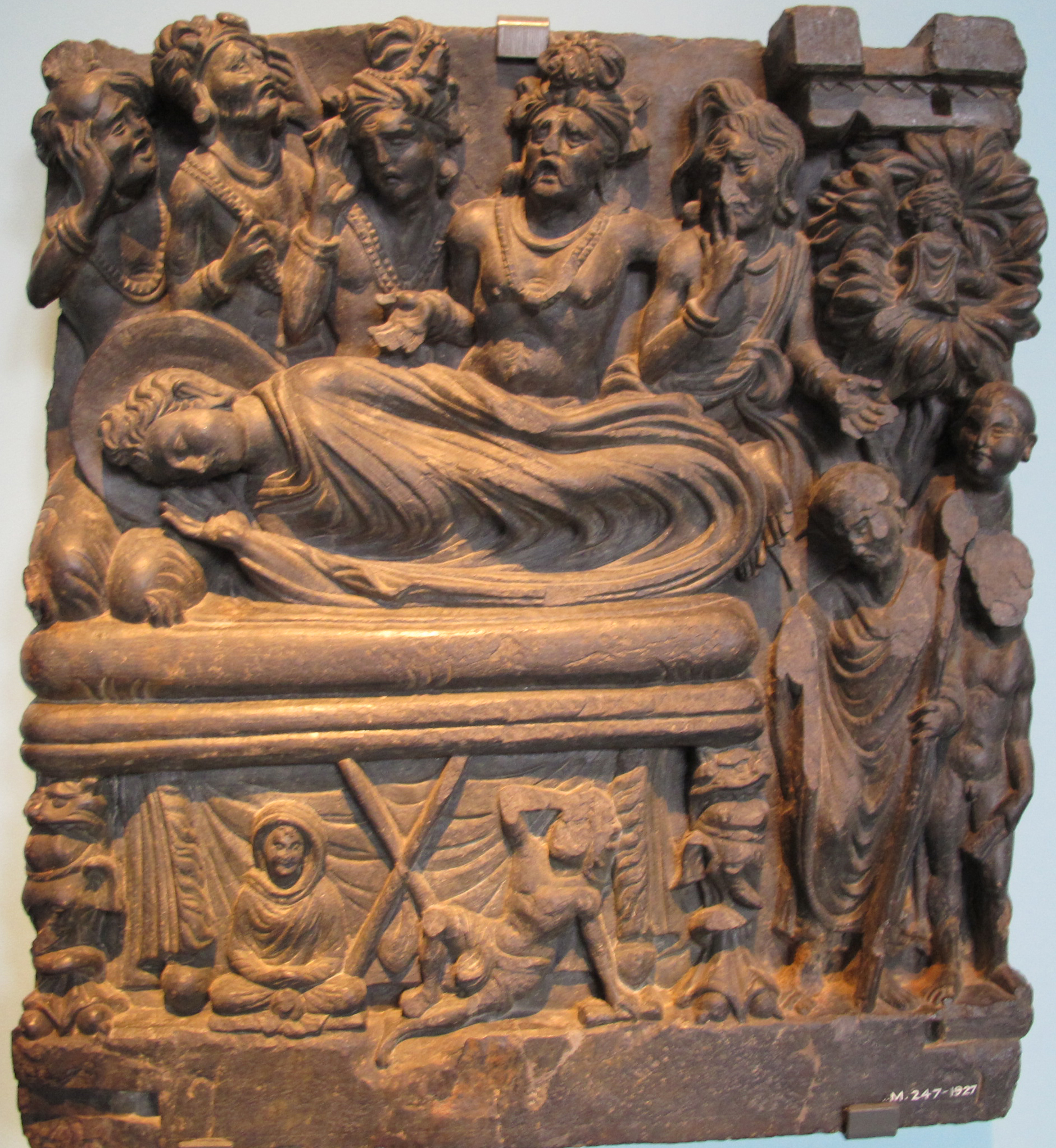 Gandhara, morte di buddha, 100-300